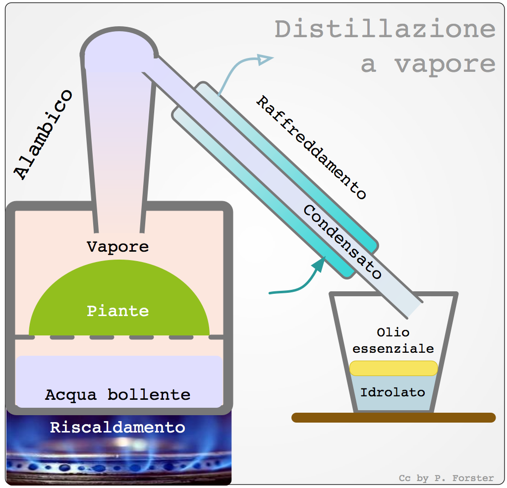 Distillazione di olii essenziali a vapore